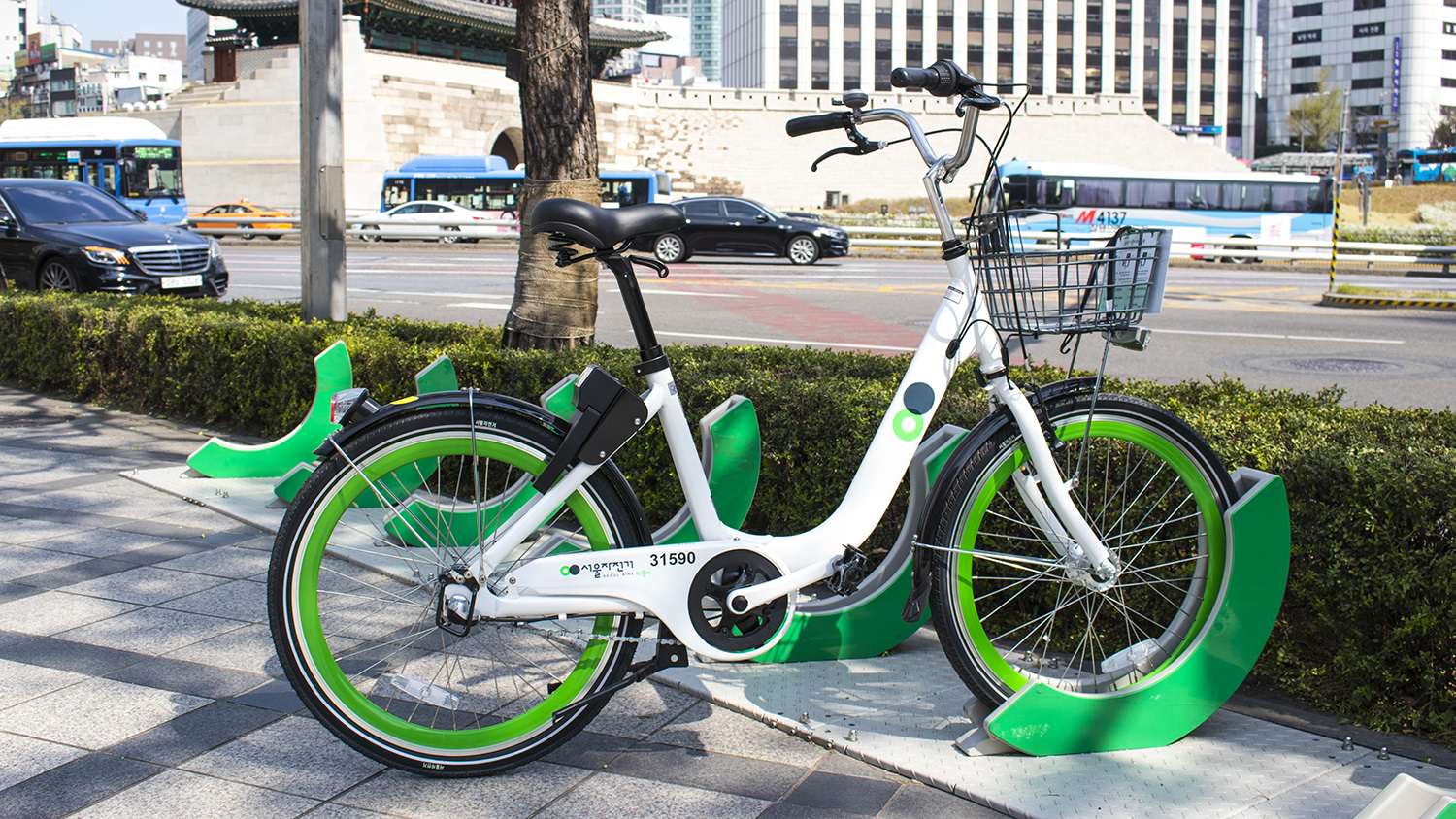 서울자전거 따릉이 QR형 뉴-따릉이 31590